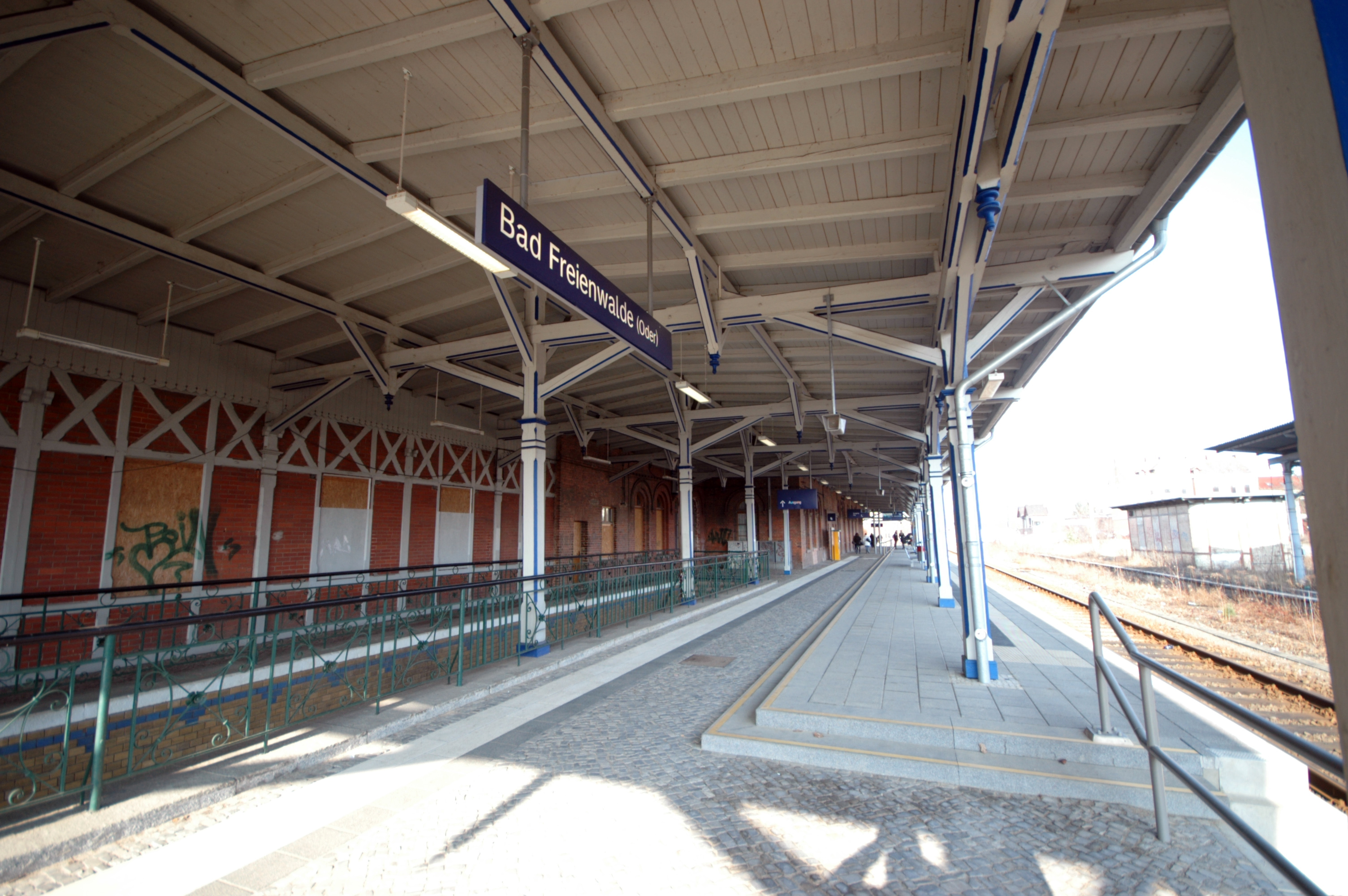 Bad Freienwalde